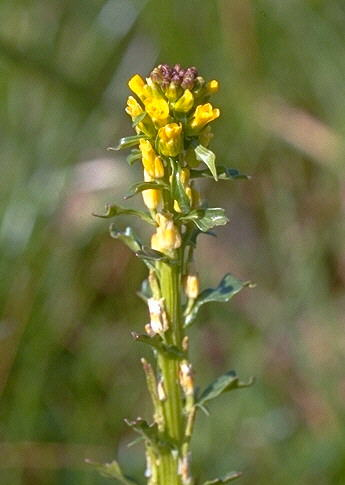 Сурепка прицветниковая Barbarea bracteosa